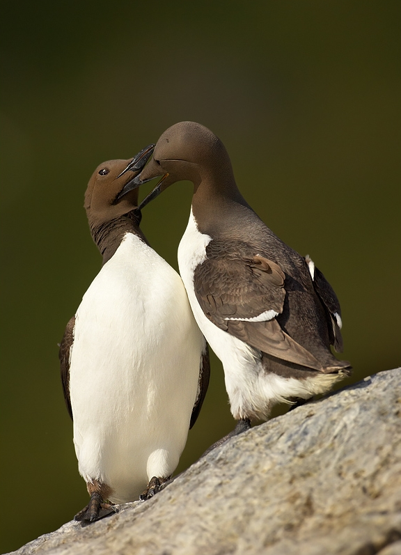 Uria aalge, Runde, Norway